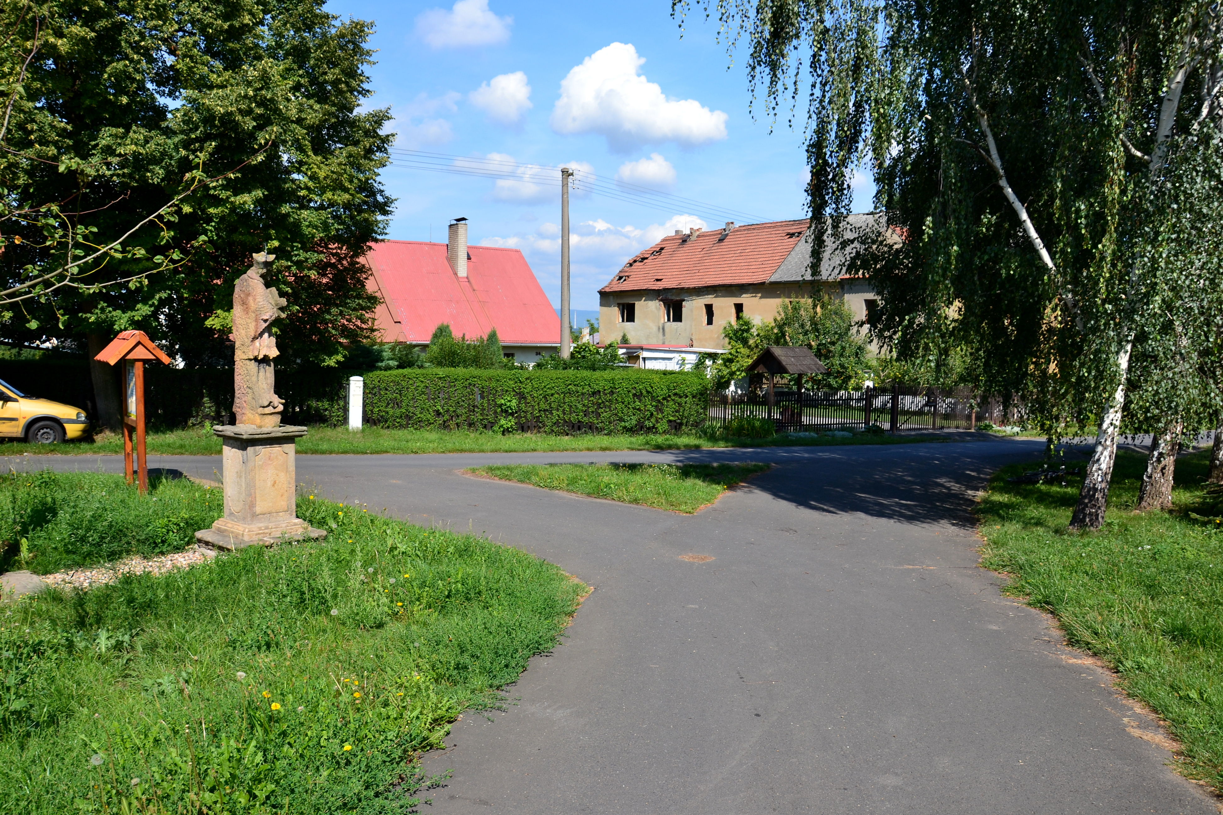 Vadkovice - náves